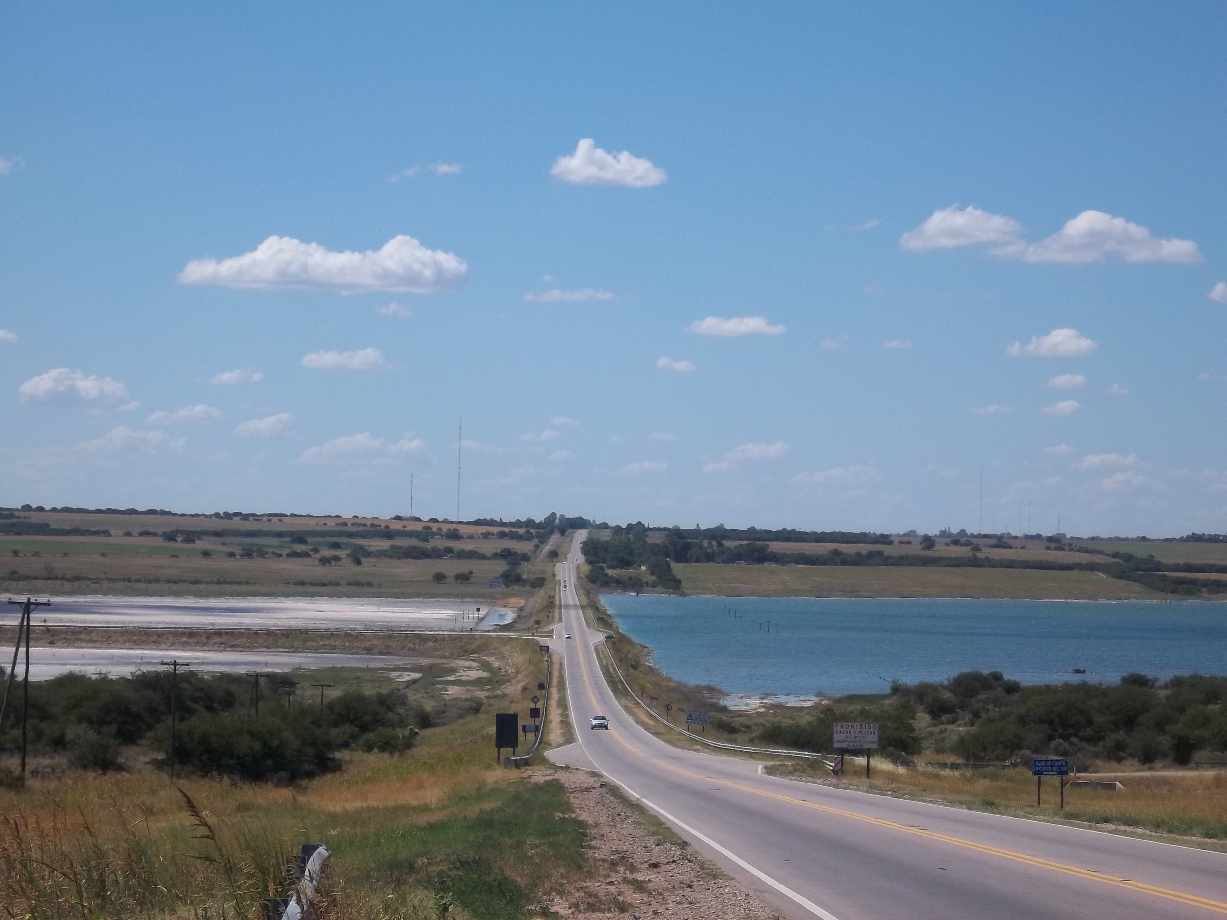 Ruta Nacional 35 en el Bajo Giuliani, a pocos km al sur de Santa Rosa, provincia de la Pampa, Argentina. En el centro, intersección con la Ruta Provincial 14.